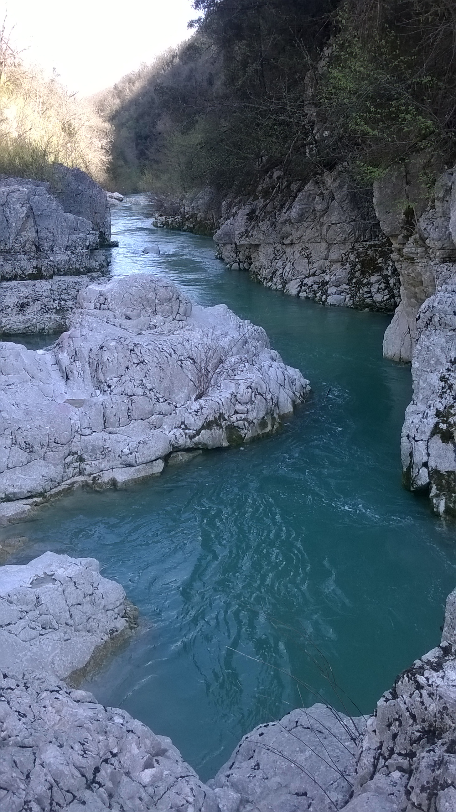 Il "Canyon" sul Volturno a Colli a Volturno